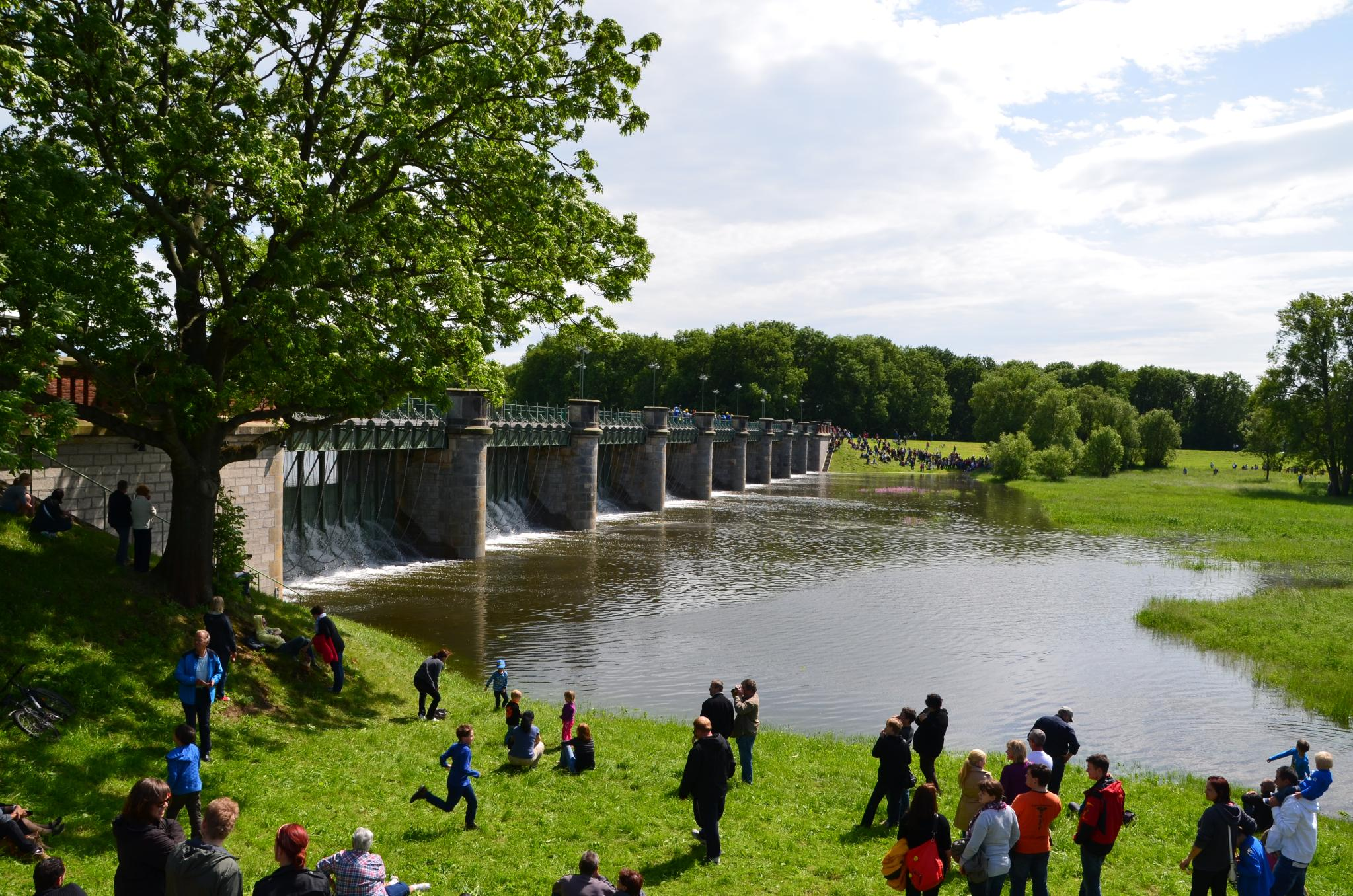 Pretziener Wehr